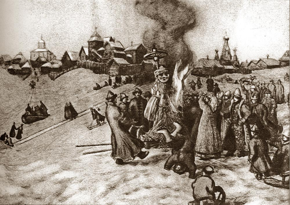 Васнецов А. М. Сжигание чучела Масленицы. Московский областной музей. (Короткова М. В. Традиции русского быта. - М., 2008. - С. 83)